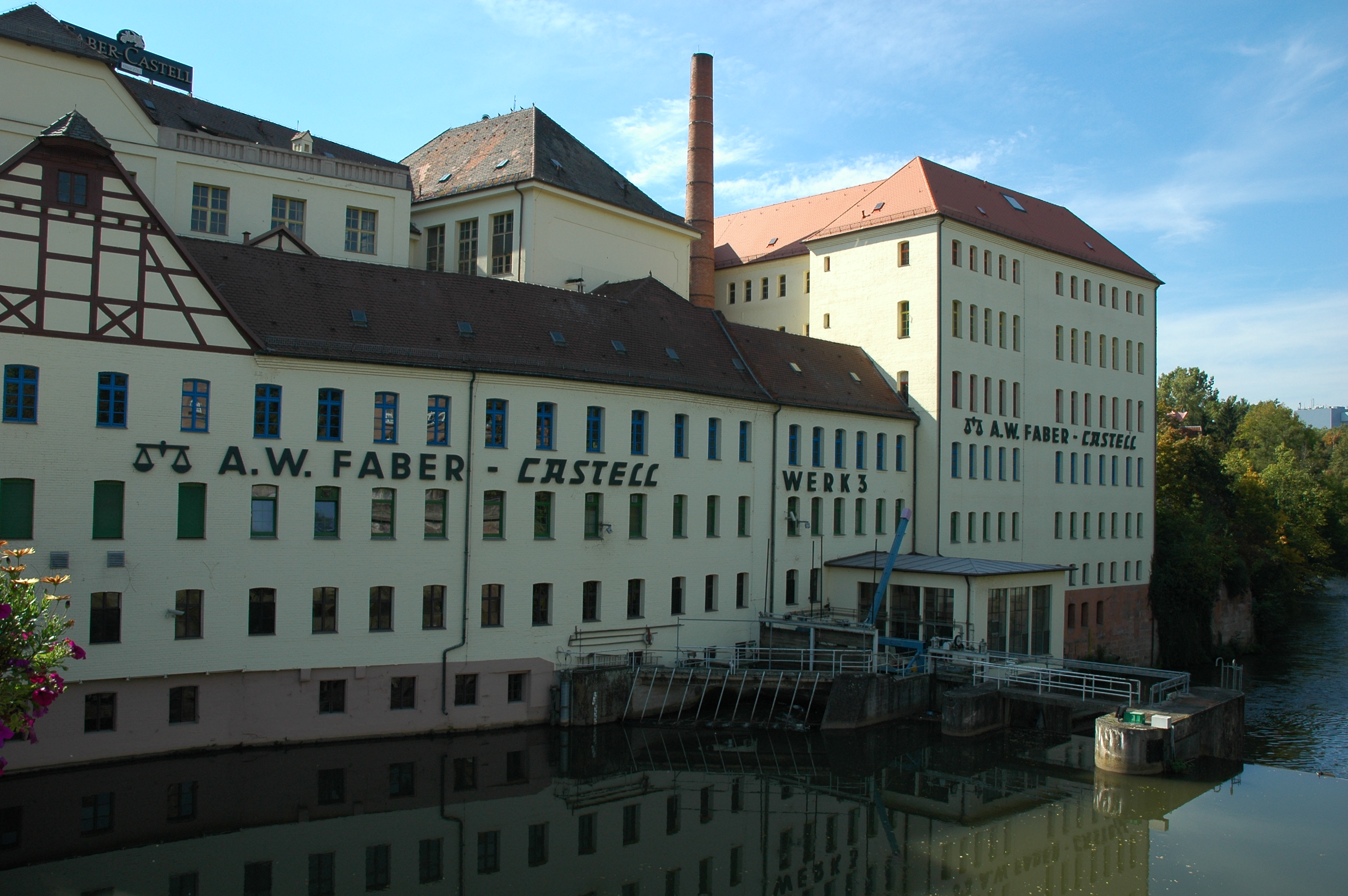 Faber-Castell-Werk in Stein bei Nürnberg